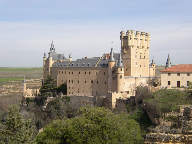 Segovia. (Castilla-León. España) Alcázar de Segovia. Fotografía realizada el 5 abril de 2004 por el autor. User:Pelayo2